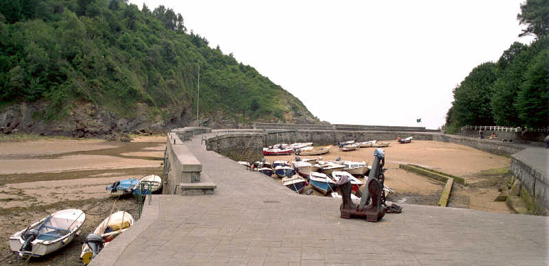 Vista de Ea (Vizcaya), (España), con el puerto y la ría en bajamar. Tomada por JMSE el 6 de julio de 2003 y cedida a Wikipedia.